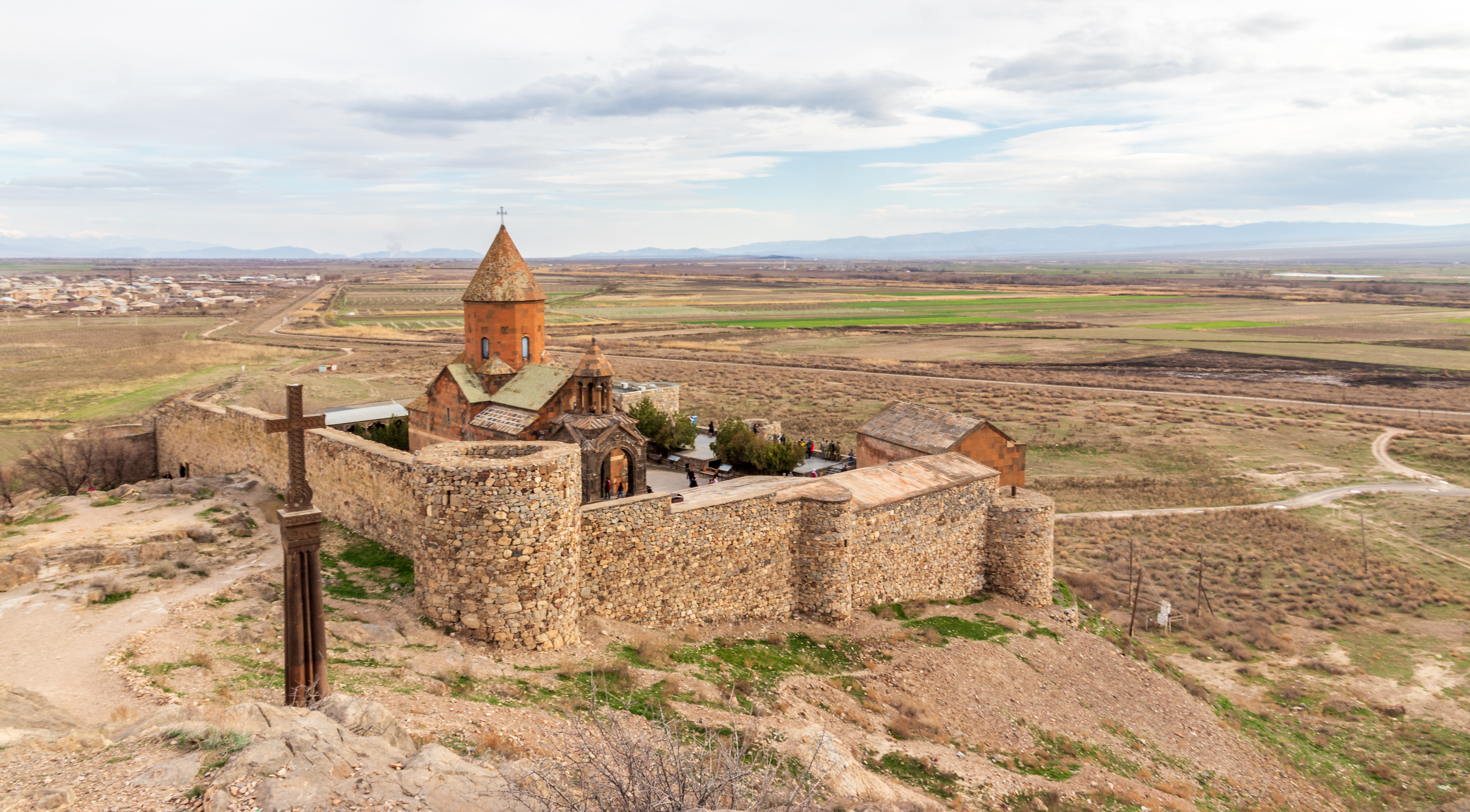 Khor Virap